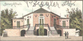 Das Stuttgarter Bärenschlössle, Ausschnitt aus einer Ansichtskarte um 1900